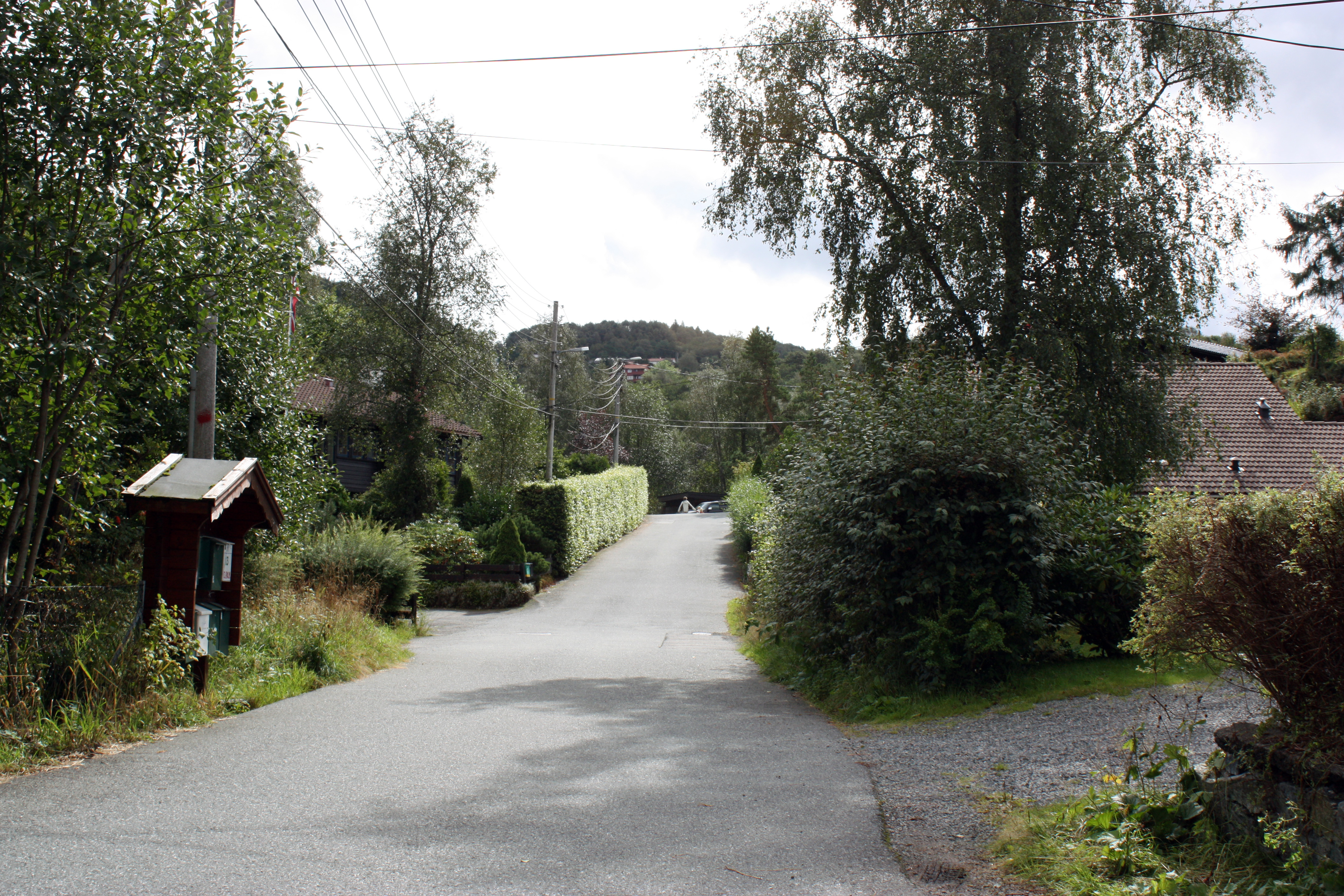 Smøråslia, Fana, Bergen. August 2009.